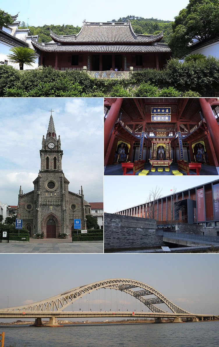 宁波市江北区拼贴画